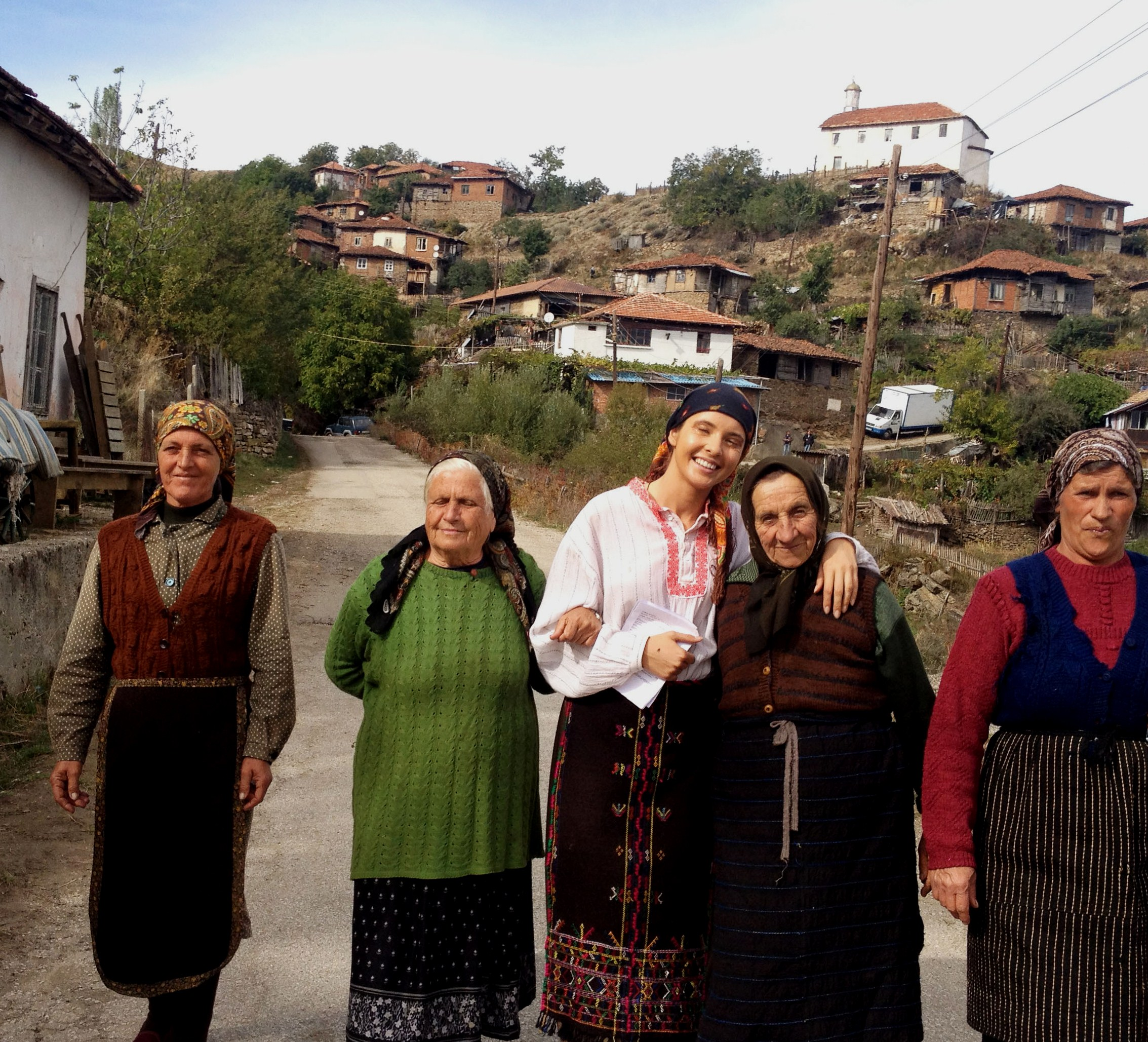 На снимките на сериала „Вангелия“ в село Яково, България